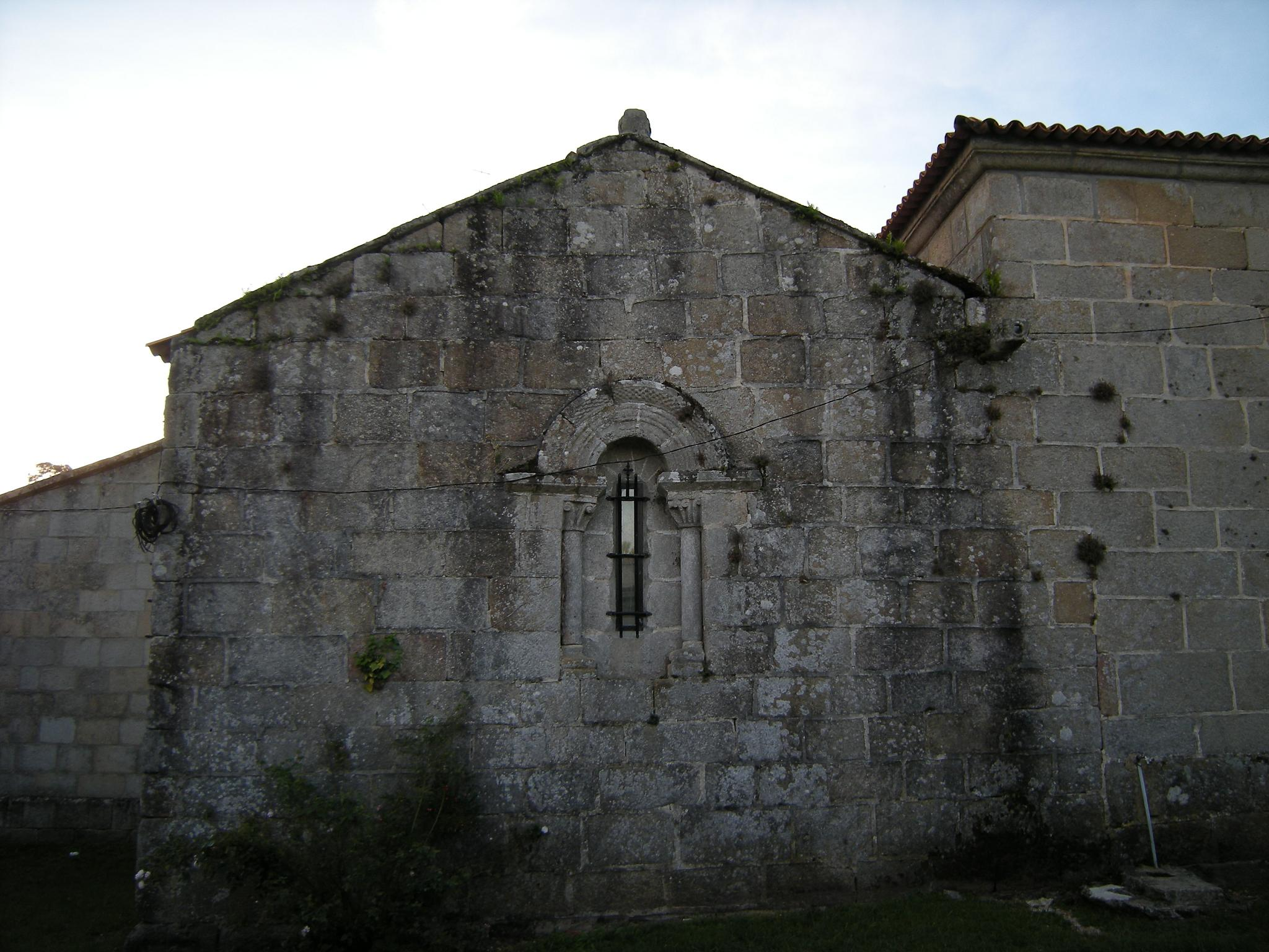 En el muro testero del ábside, encontramos una ventana de arquivolta de medio punto, de similar factura a la situada en el muro testero de la nave.